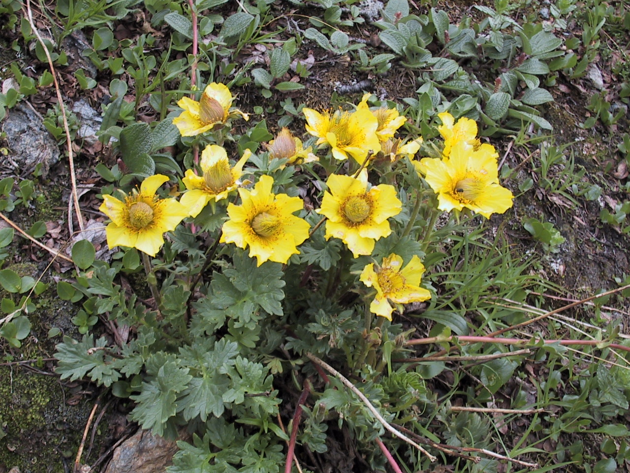 Bergblumen in der Nähe der Martellerhütte im Martelltal im Vinschgau